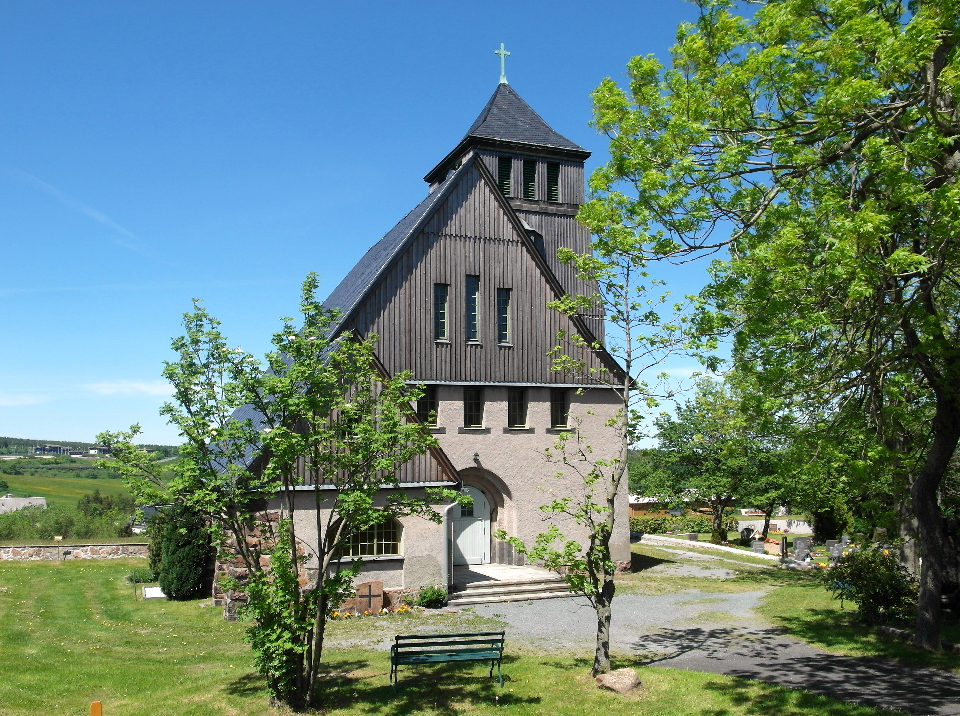 01.06.2017 01773 Zinnwald (Zinnwald-Georgenfeld zu Altenberg/Sachs.): Evangelische Exulantenkirche Zinnwald, Teplitzer Straße 23 (GMP: 50.736385,13.760752) Erbaut 1908-1909 nach Plänen der Dresdner Architekten Lossow & Kühne. Sicht von Süden. [SAM0033.JPG]20170601215DR.JPG(c)Blobelt